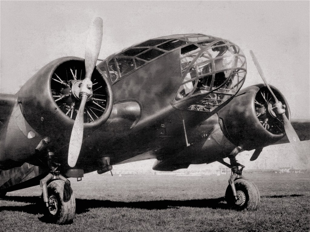 aereo da ricognizione Caproni Ca.311, matricola MM. 11531, fotografato presso gli stabilimenti dell'Aeronautica Caproni di Vizzola Ticino, provincia di Varese. Categoria:Immagini di aeroplani